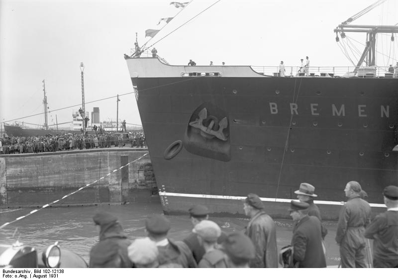 Die feierliche Einweihung der "Nordschleuse" der grössten Schleuse Europas, in Bremerhaven. Als erstes Schiff passierte der deutsche Ozeanriese "Bremen" die Schleuse. Der Bau kostete ca. 34 Millionen Mark. Der deutsche Ozeanriese "Bremen" durchschneidet bei seiner Einfahrt in die Nordschleuse, der grössten Europas, das Band.